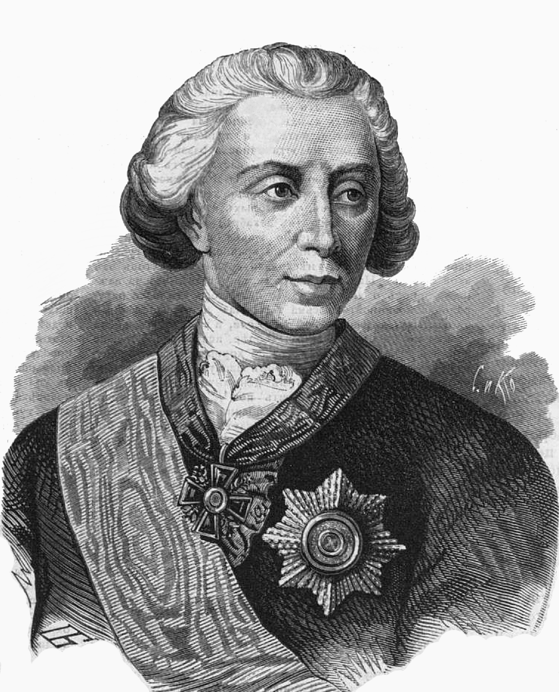 Неплюев Иван Иванович (1693—1773), русский государственный деятель